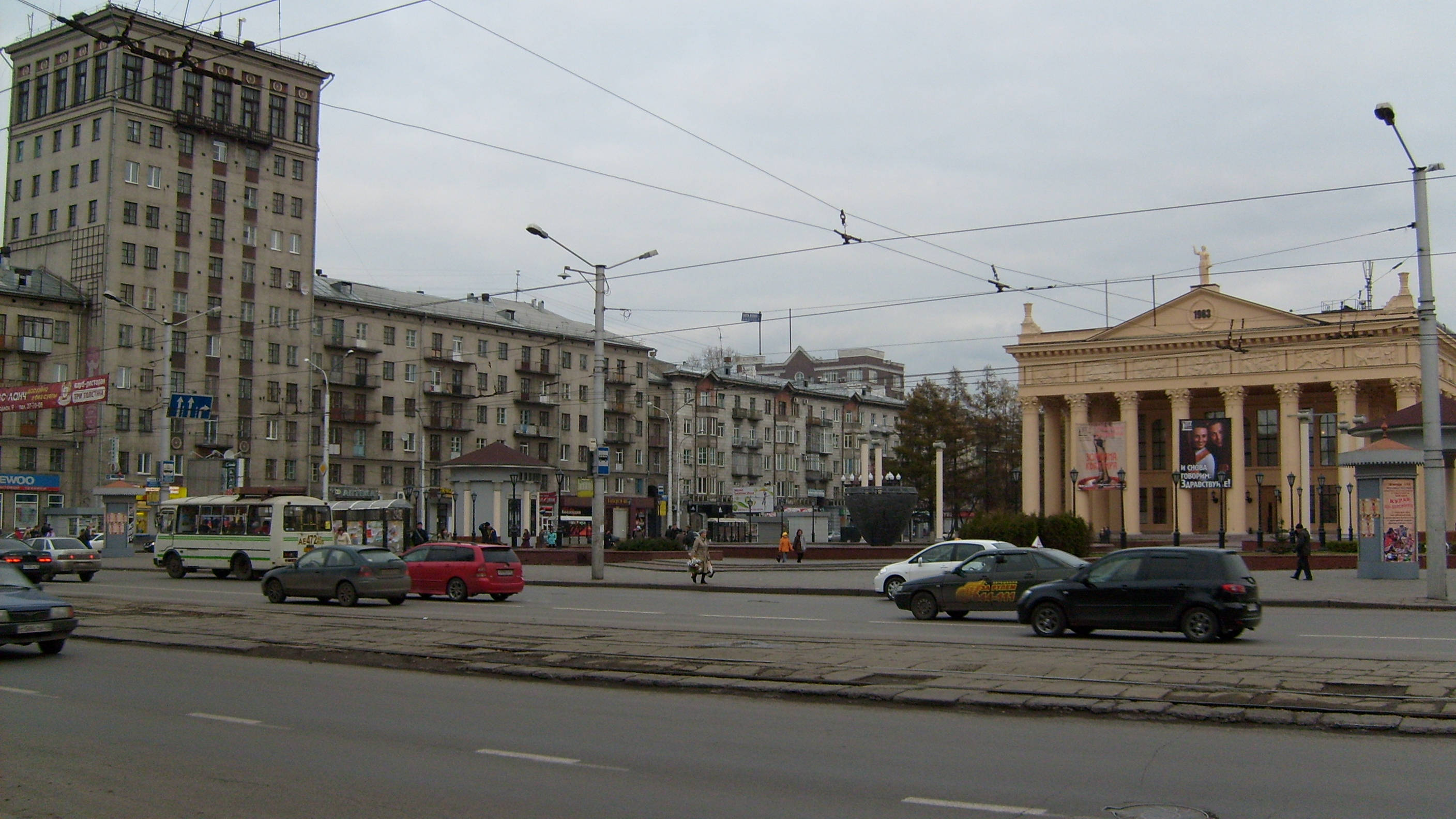 Театральная площадь: перекрёсток Металлургов и Кирова.